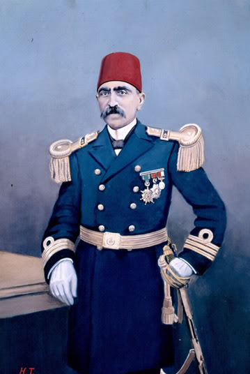 Süleyman Nutku